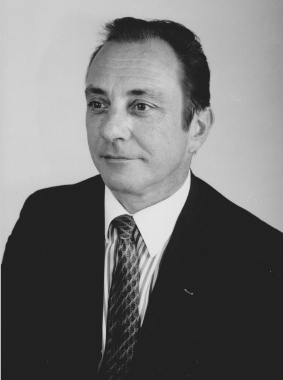 Portrait de Pierre Pincemaille.